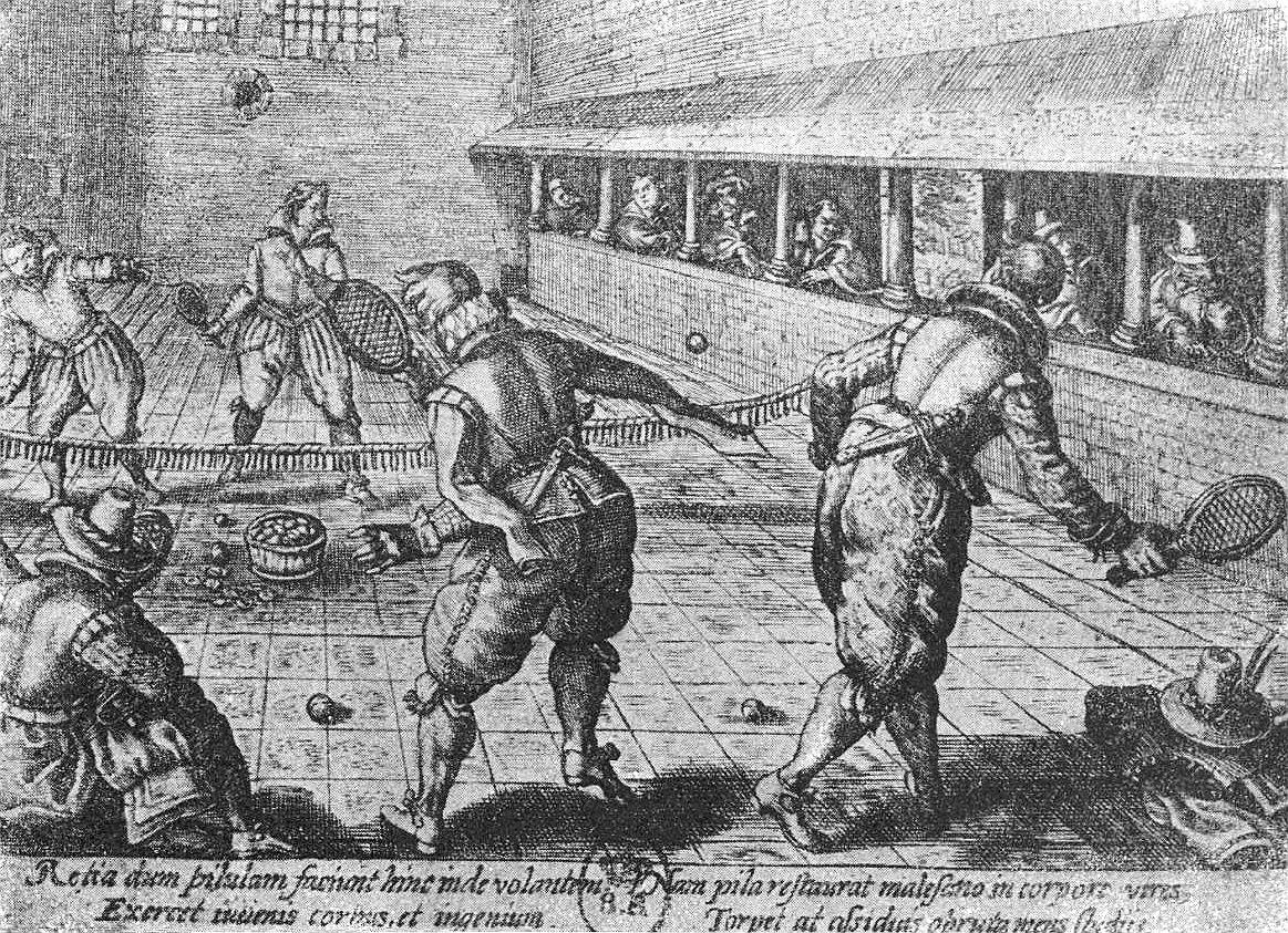 Joueurs de paume dans la première moitié du XVIIe siècle.